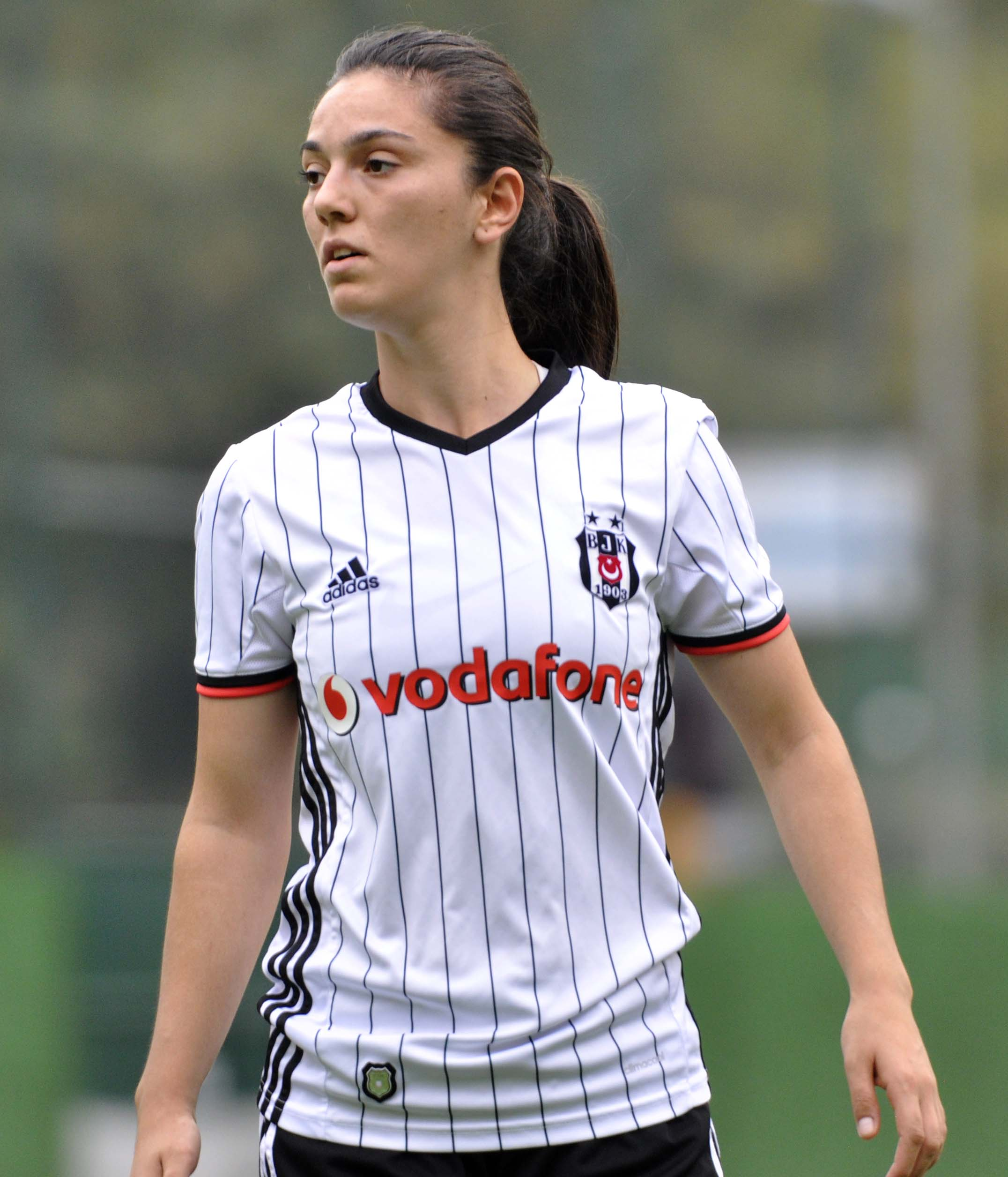 Funda Payan, Beşiktaş formasıyla